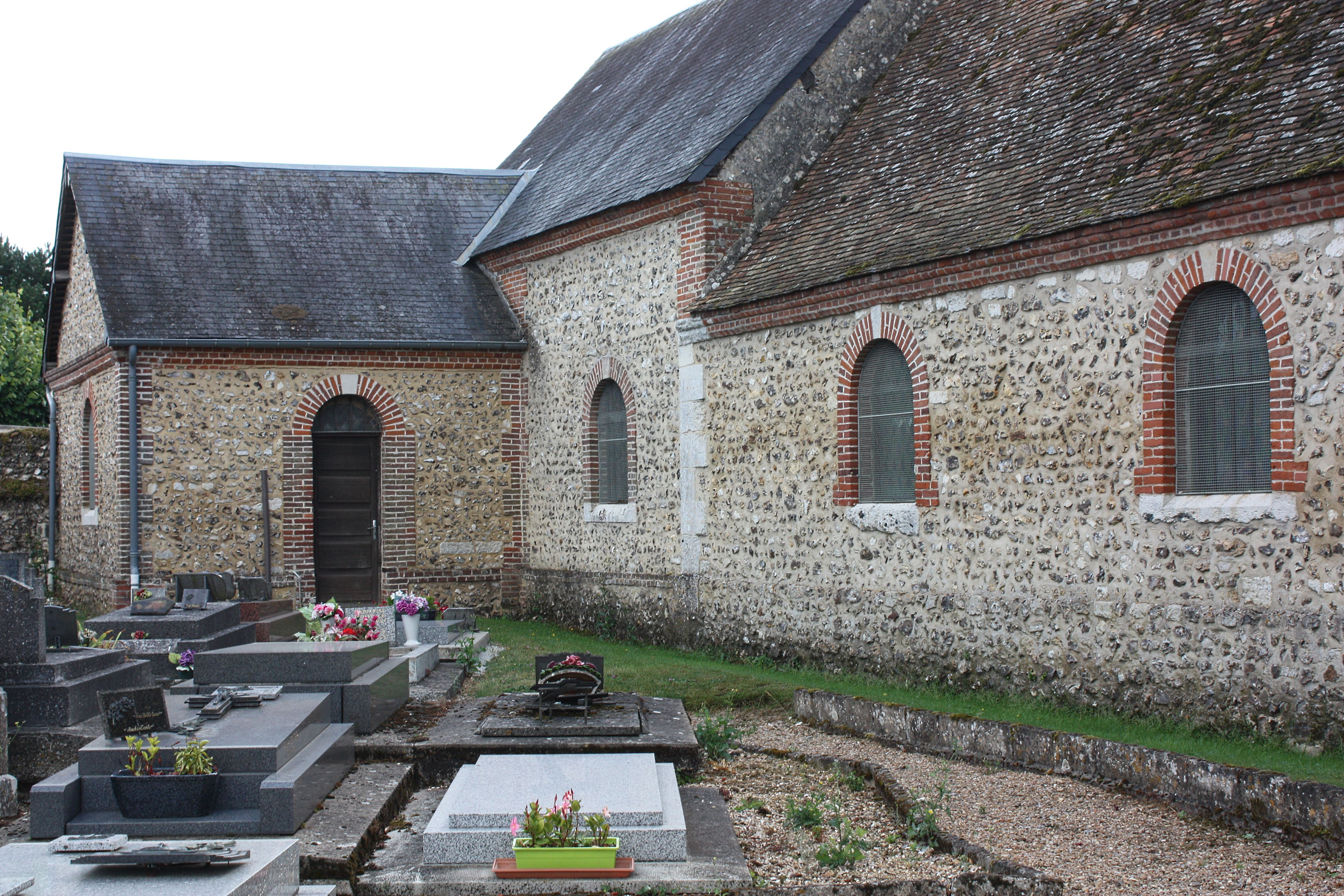 Le Boulay-Morin - Eglise Saint-André